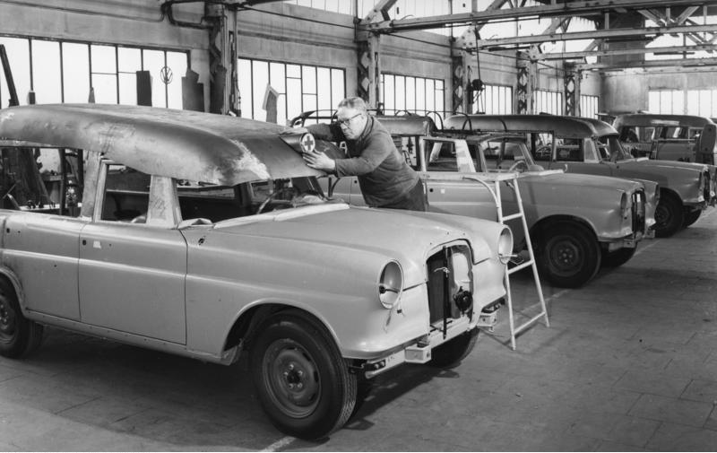 Bonn, Januar 1964 Fahrzeug+Karosseriewerke Chr. Miesen Herstellung des Dachaufbaus für einen Krankentransportwagen